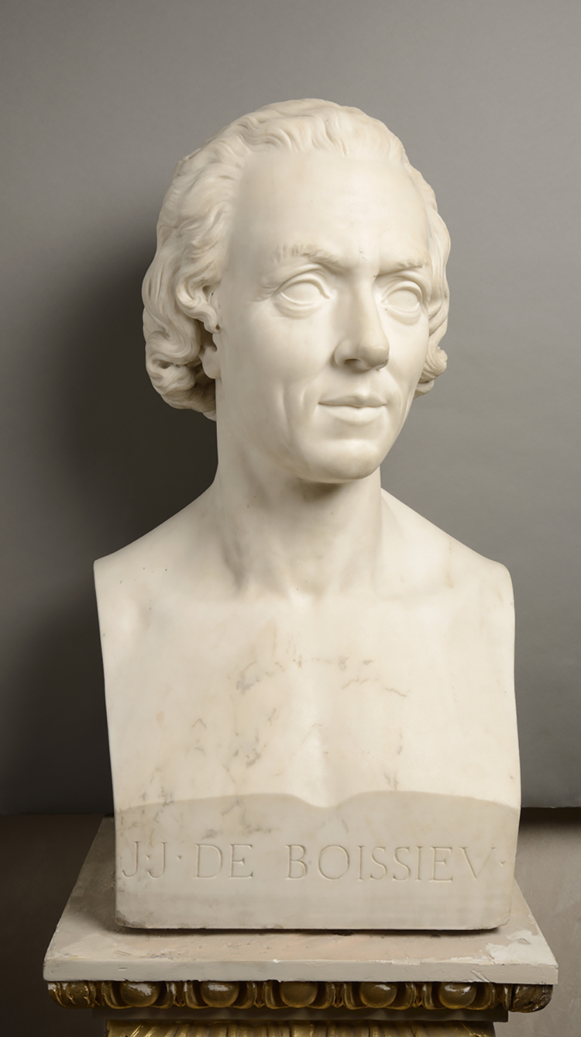 Sculpture